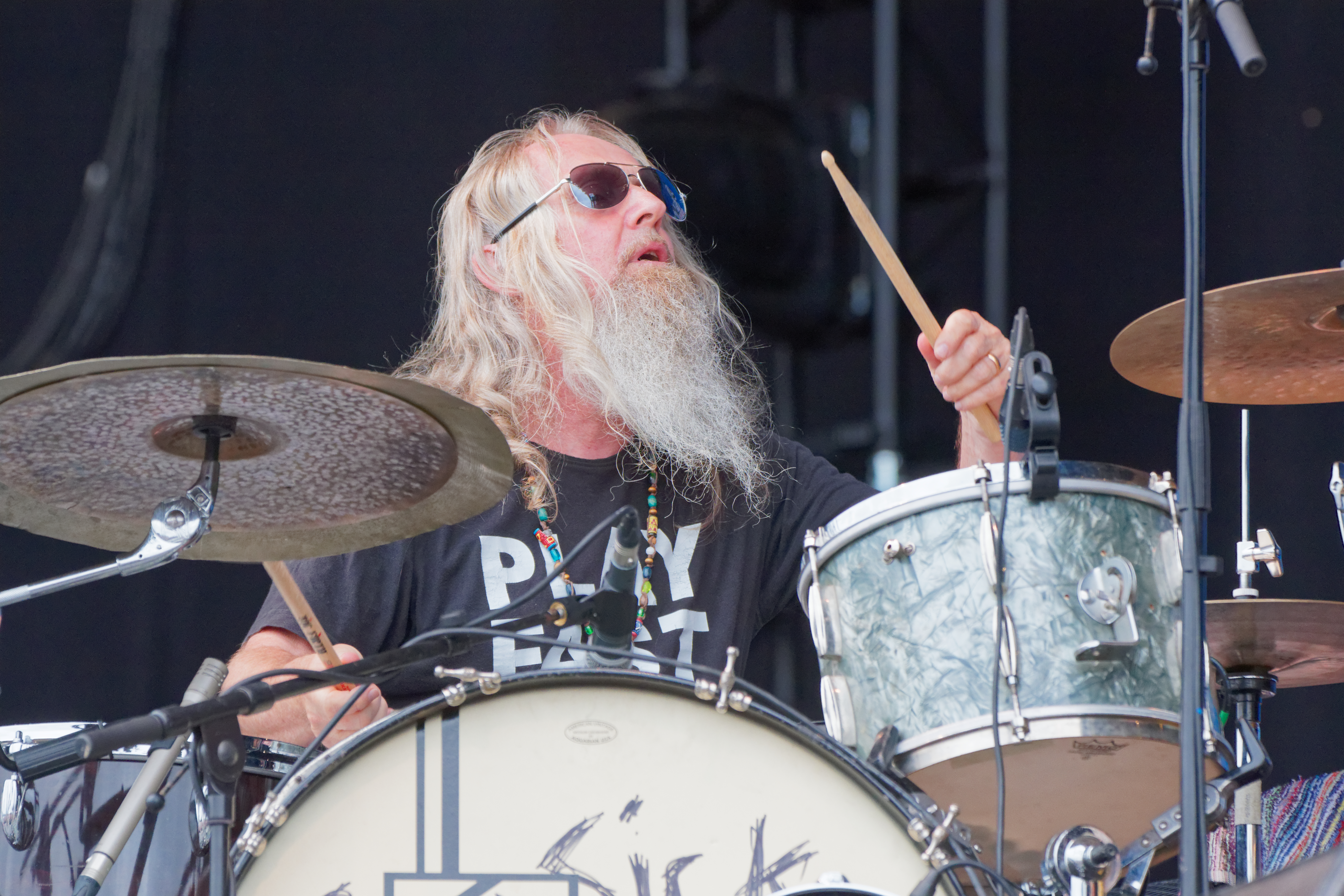 Seasick Steve en concert lors du festival des vieilles charrues 2017.